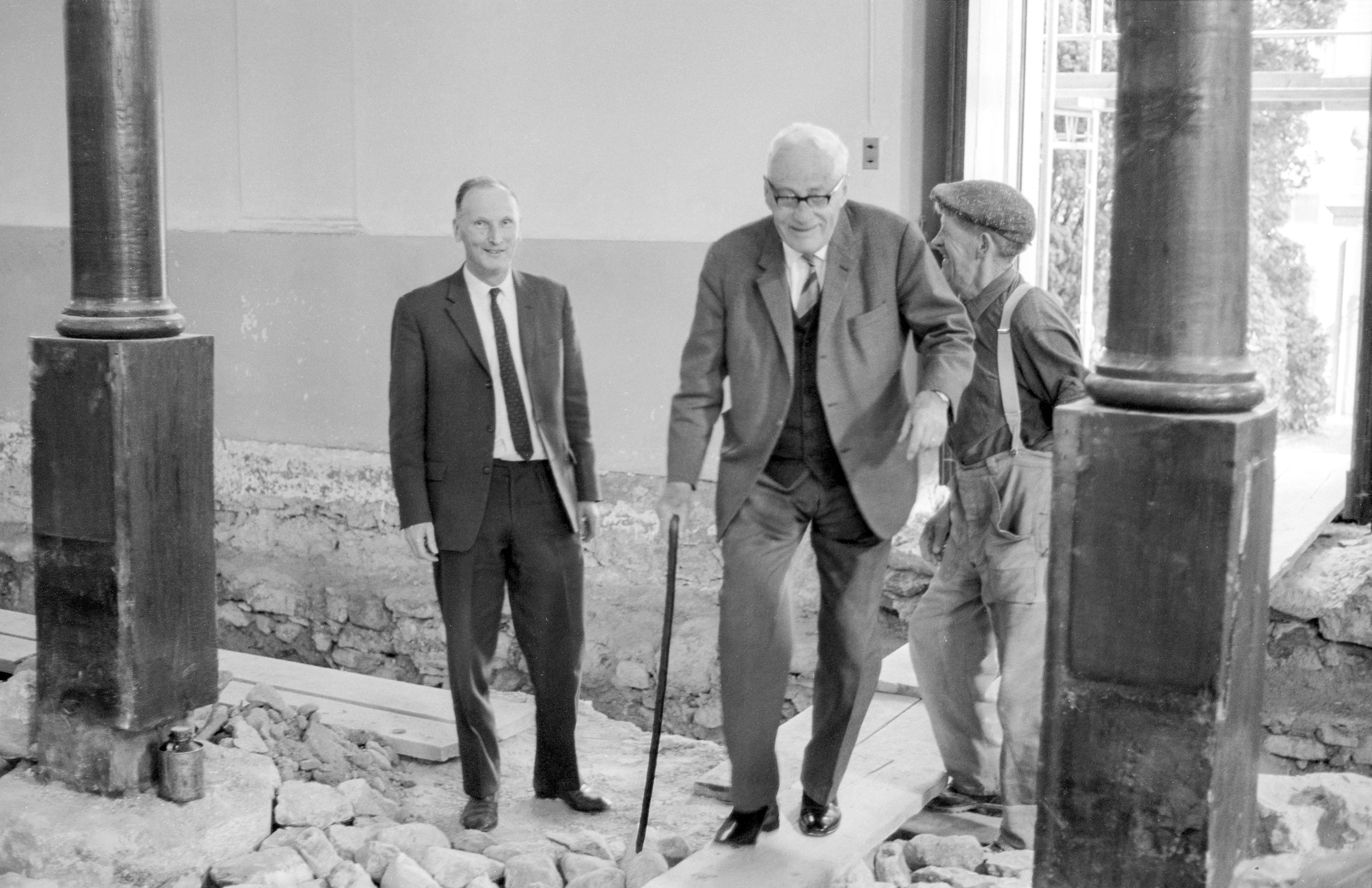 Bildarchiv der Kantonsarchäologie Aargau Kürzel/FotoNr.: See.69.1.28 Archiv Nr. S/W: GB 154/42 Objekt: Kirche Lage: Seengen Aufnahmedatum: 1969 Zeitgenössische Beschriftung: ohne zeitgenössische Beschriftung Im Bild, von links nach rechts: Karl Holliger, Dr. Reinhold Bosch, und "Bruder Franz" (Baugeschäft Grundmann) Ausgrabung: Kirche Seengen Datierung des Befundes: - Erste fassbare Kirche: 7./8. Jh. - Nachfolgebau: 10./11. Jh. - Dritter Bau im Hochmittelalter: 12./13. Jh. - Um 1490/96 wurde die romanische Kirche in eine dreischiffige Hallenkirche mit langrechteckigem Chor und integriertem Kirchturm umgebaut. Literatur: - R. Bosch, Die archäologischen Forschungen in der Kirche von Seengen, Heimatkunde aus dem Seetal 42/43, 1969/1970, 23-30; - José Diaz Tabernero, Zwischen Bern, Luzern, Zürich und Basel: Münzen aus Aargauer Kirchen, Schweizerische Numismatische Rundschau 87, 2008, 147-184, und Taf. 9-12; insbes. 182, und Taf. 12